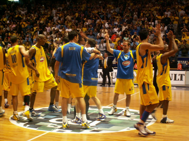 מכבי תל-אביב, כולם למען אחד ואחד למען כולם. צולם על-ידי אבי קדמי ב - 2005 - 2006.